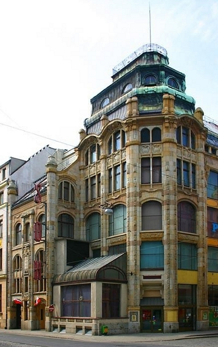 Wrocław, Poland